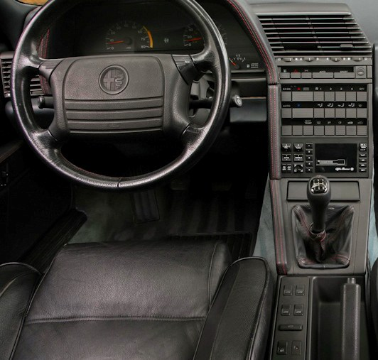 Posto guida Alfa Romeo 164 1991